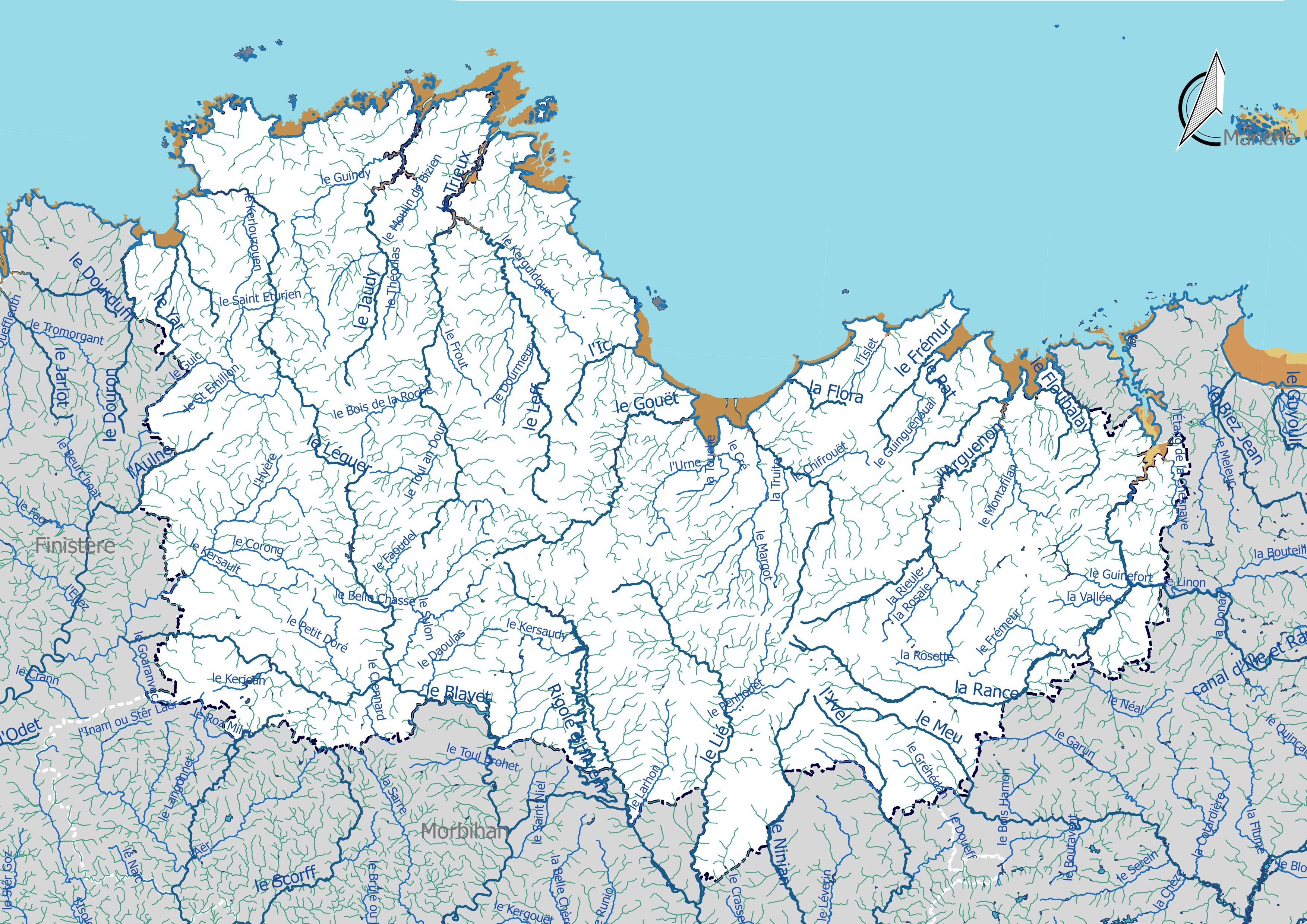 Réseau hydrographique du département des Côtes-d'Armor (France).